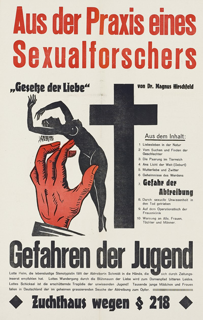 Gesetze der Liebe - Aus der Praxis eines Sexualforschers. Gefahren der Jugend - Zuchthaus wegen § 218. Regie: Dr. Magnus Hirschfeld. Anonymer Plakatentwurf, Deutschland 1927/28. 79 x 46,4 cm.